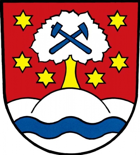 Znak,Ruda nad Moravou , okres Šumperk